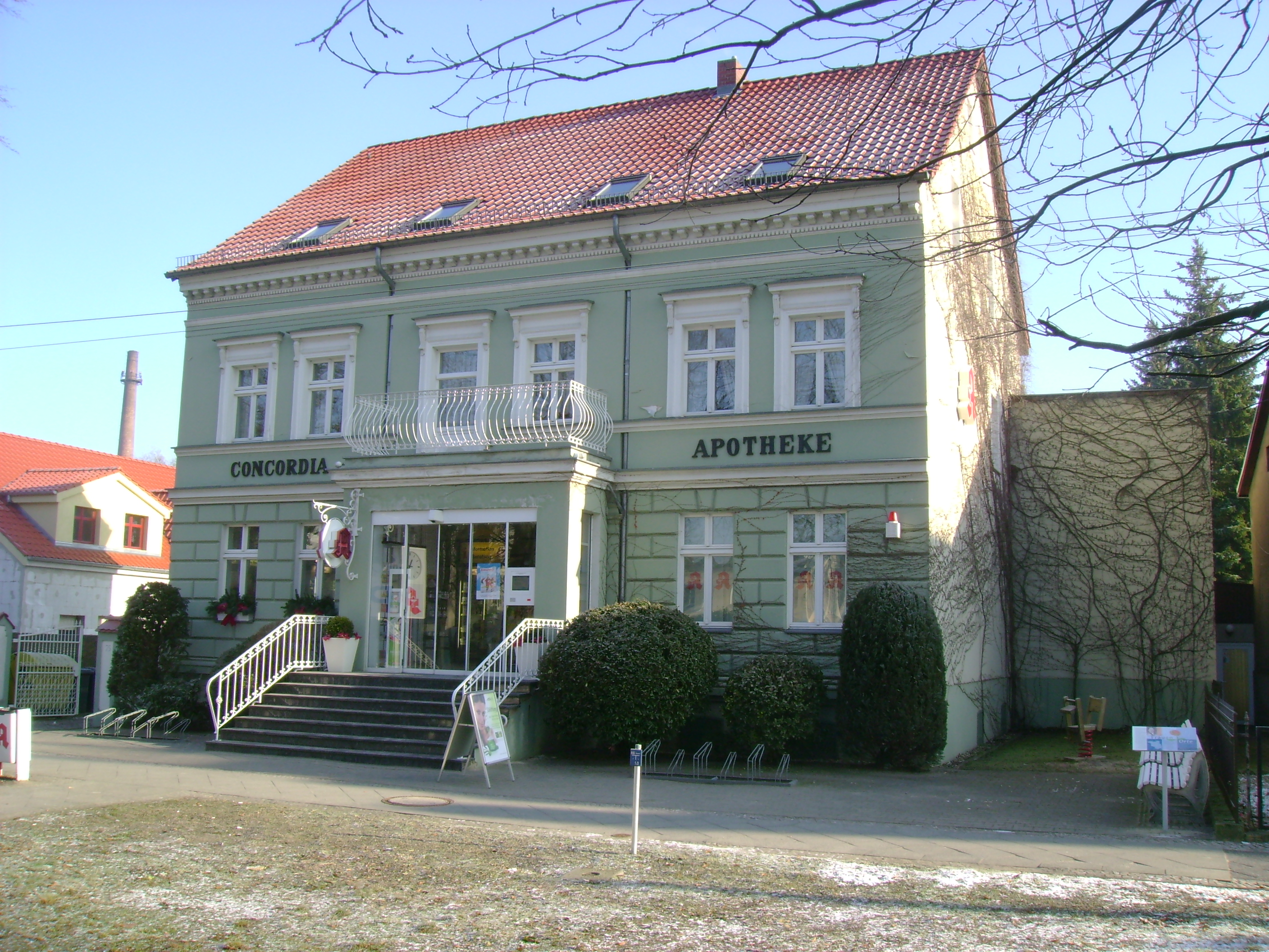 Concordia Apotheke in Velten, Breite Straße